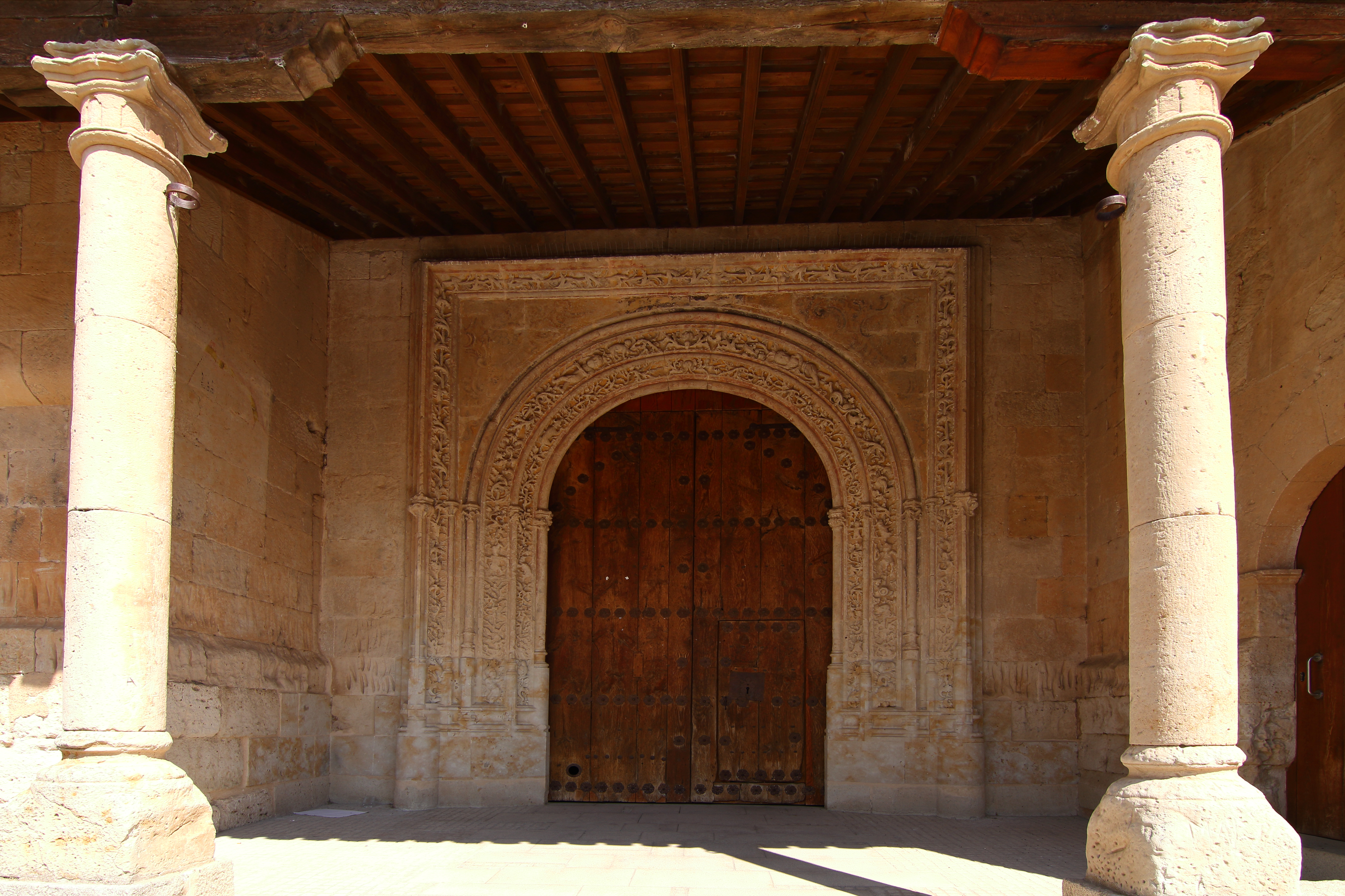 Puerta principal Iglesia de la Exaltación de la Cruz en Palencia de Negrilla